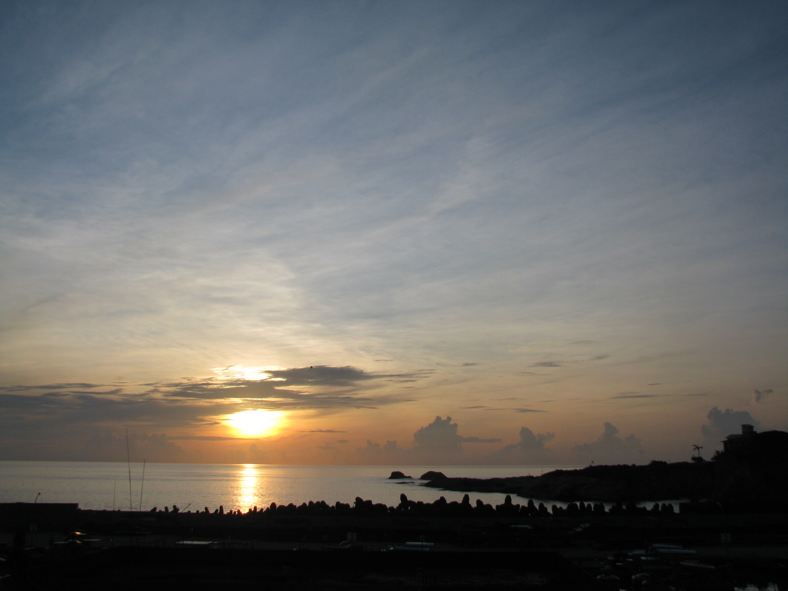 石梯坪漁港-日出